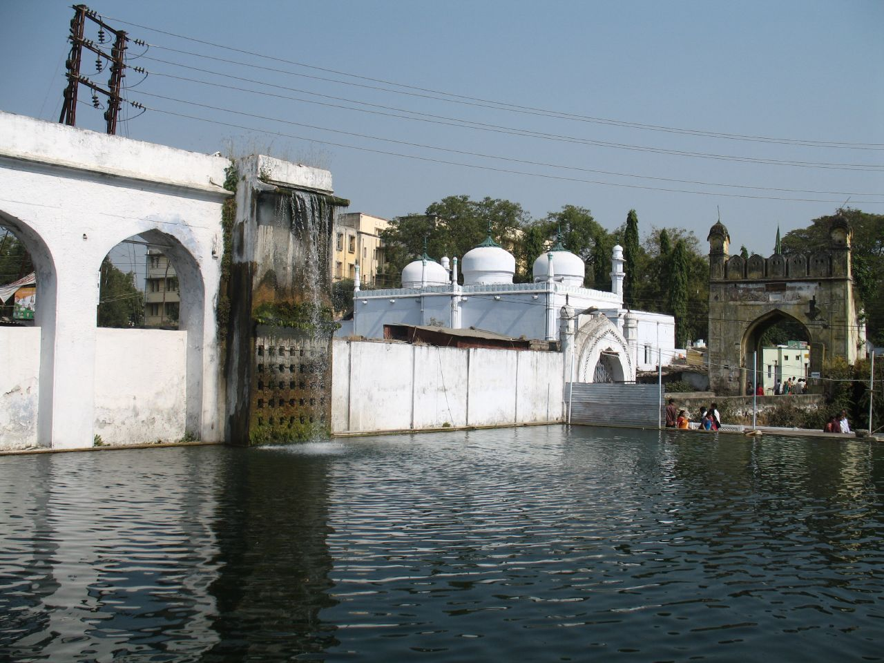 Panchakki fountain, Aurangabad